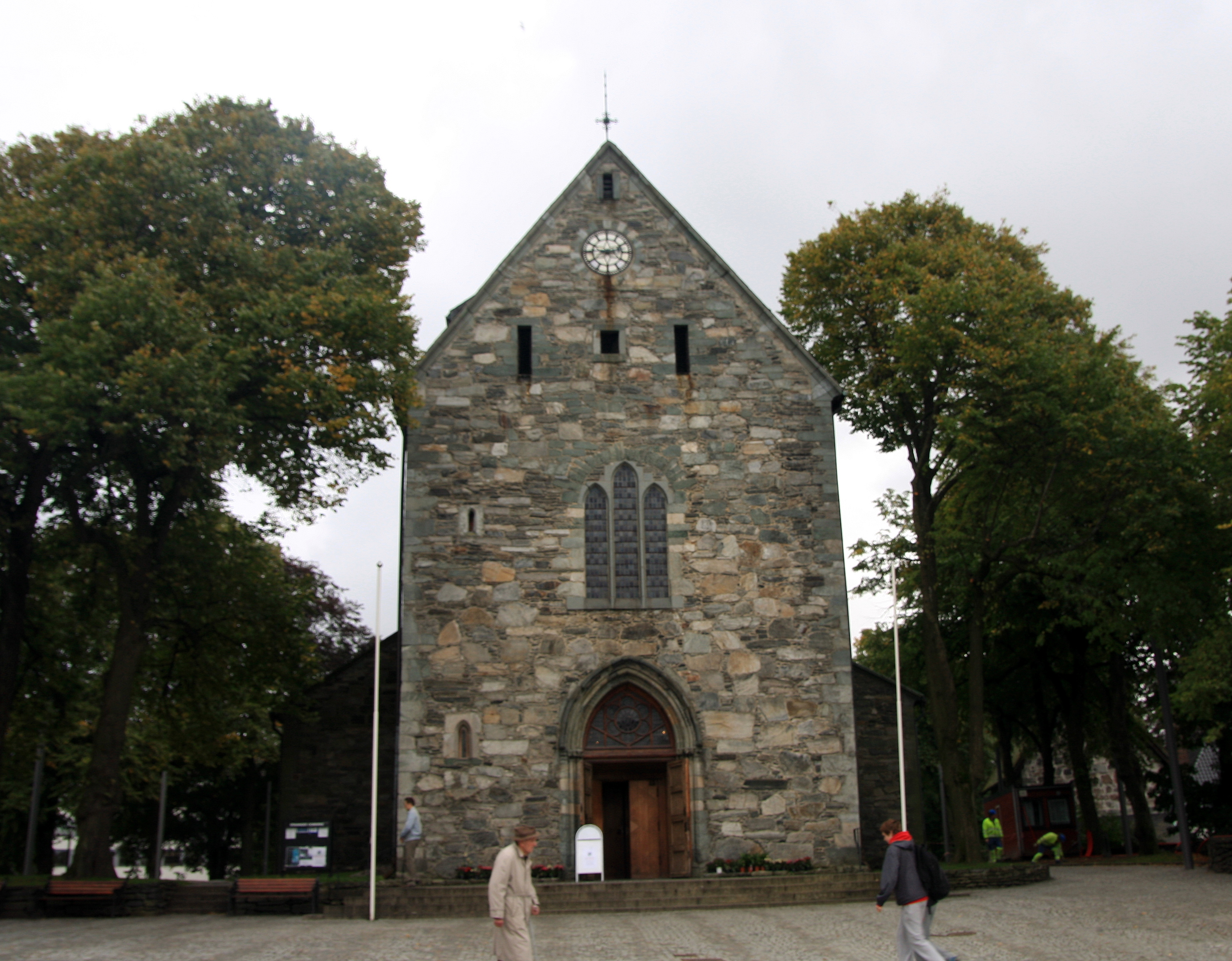 Domkirken Stavanger inngangsparti